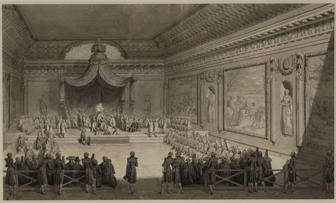 Französische Notabelenversammlung von 1787 (Originalbildbeschreibung: "Assemblée des notables tenue a Versailles le 22 février 1787 : cette Assemblée fut composée des princes, des officiers de la Couronne,..."